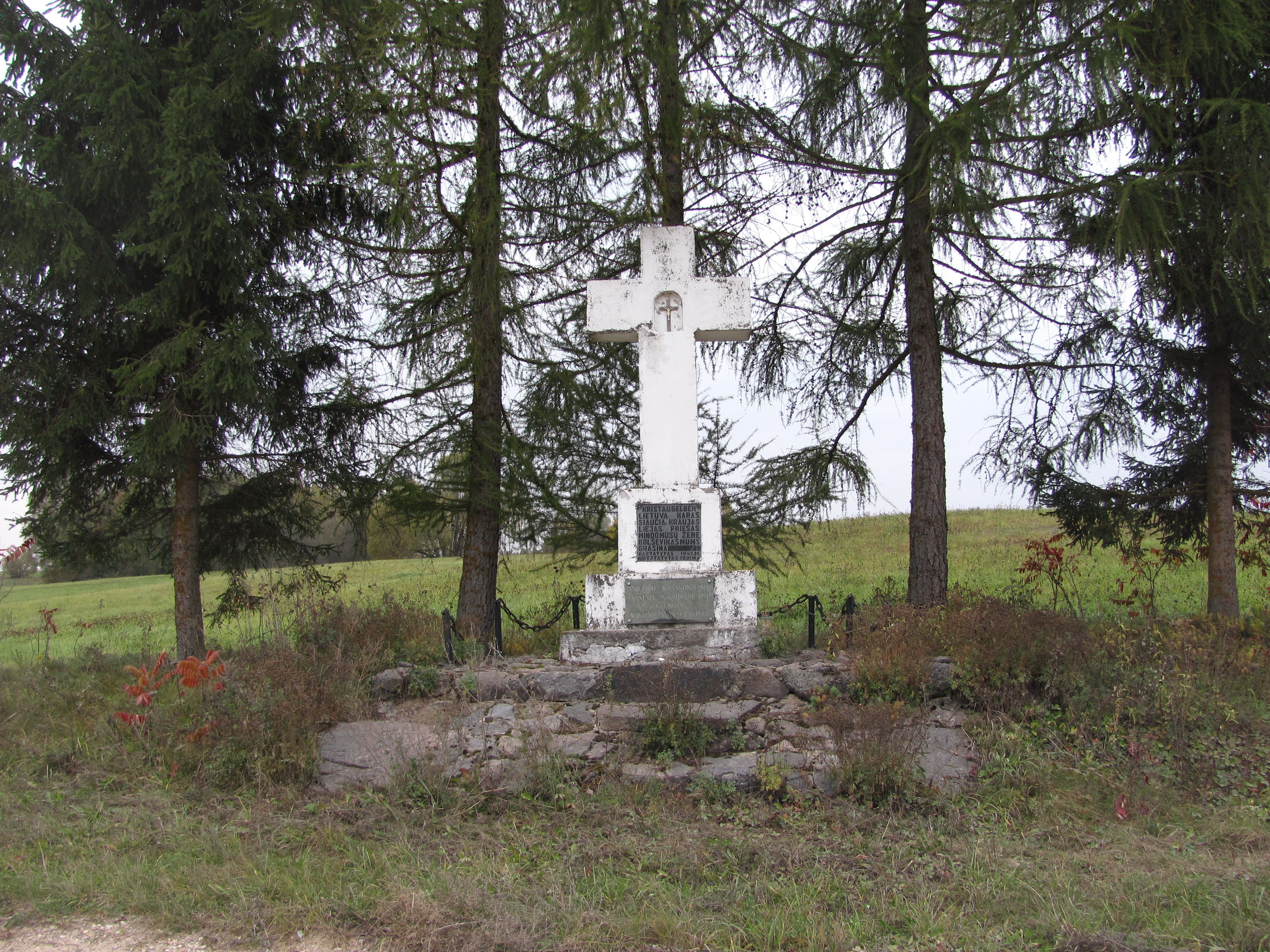 Dusetų sen., Lithuania